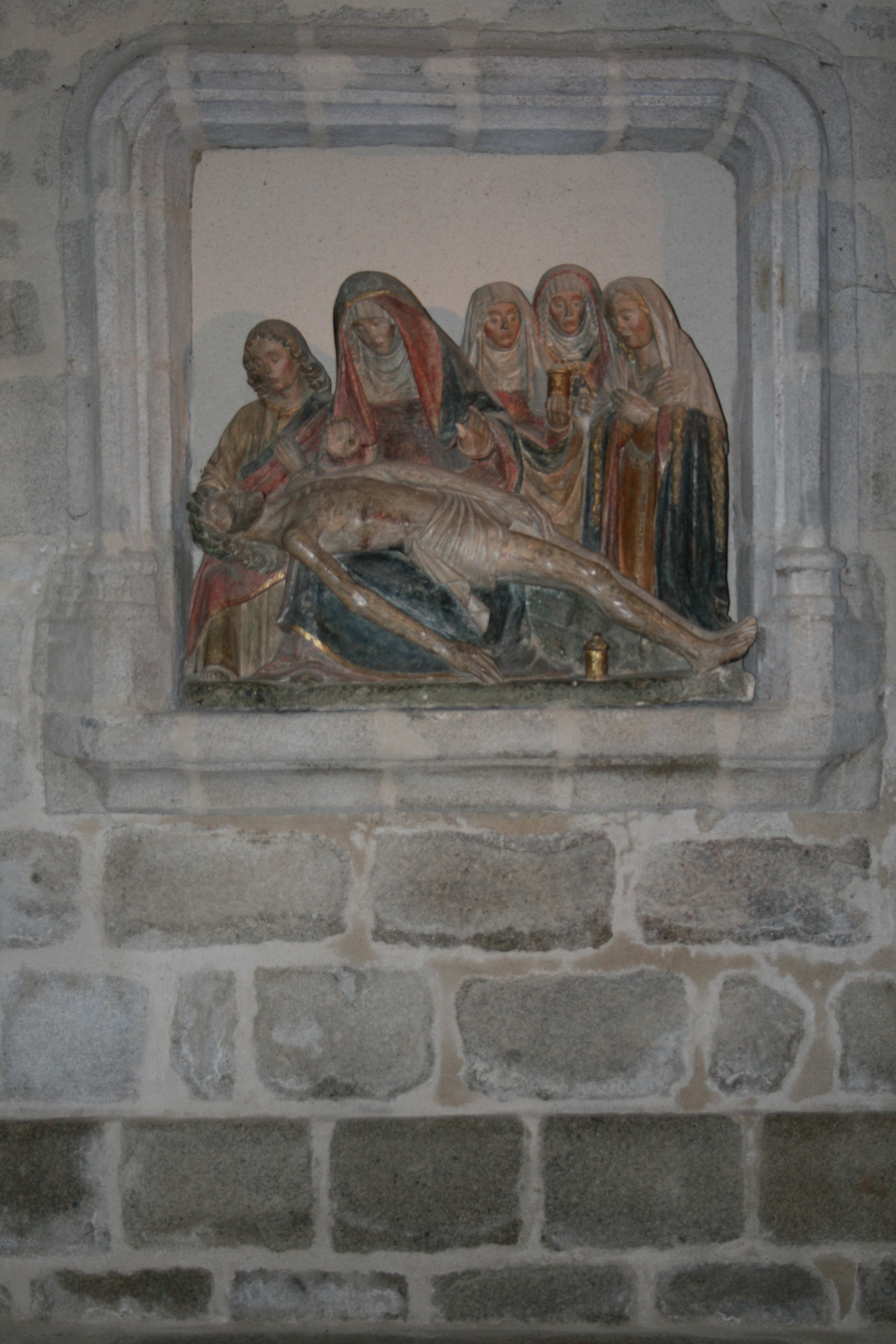 Eglise d'Ahun, Creuse, France. Piéta du XVe siècle